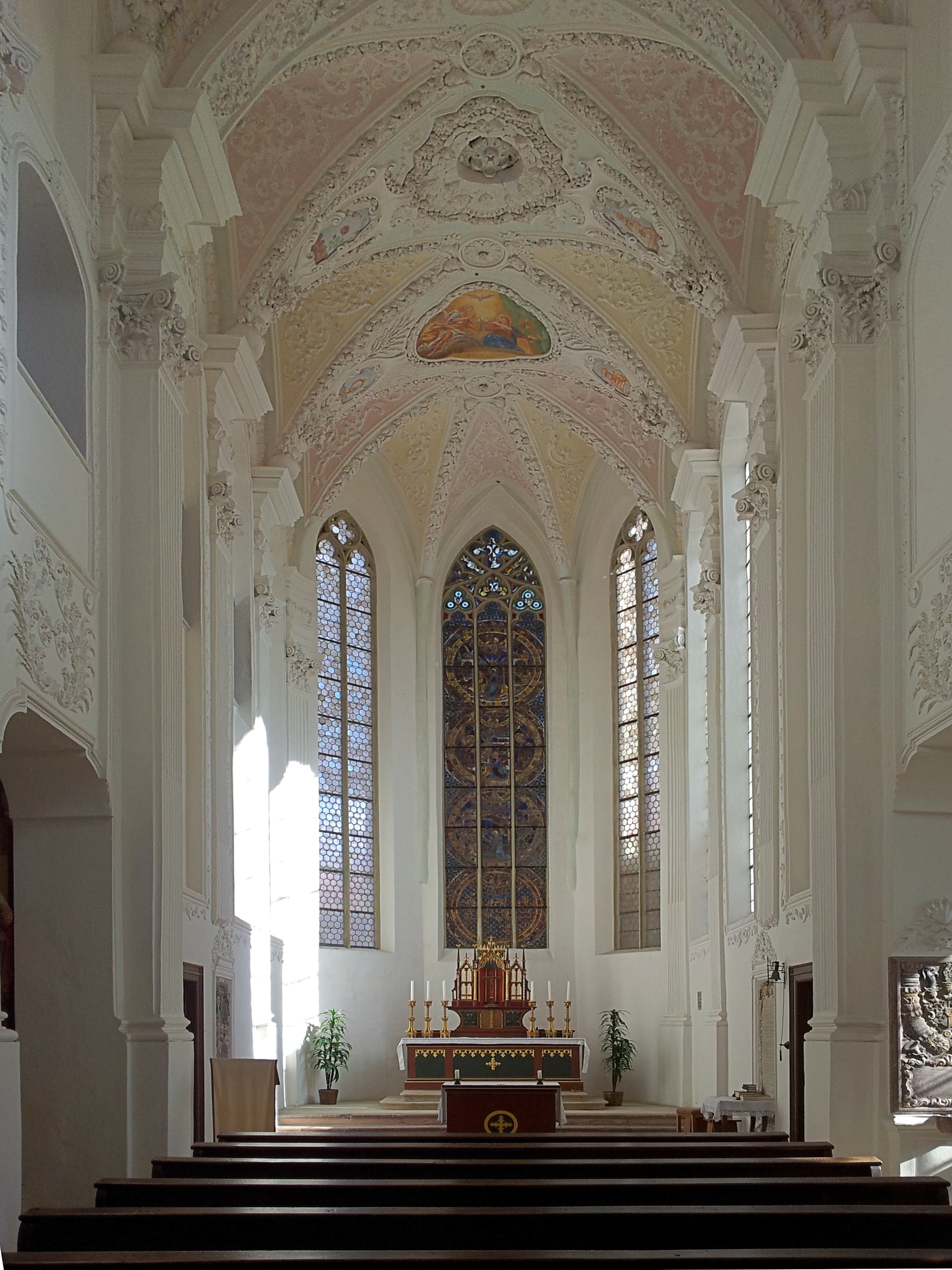 St. Benedikt (Freising) innen